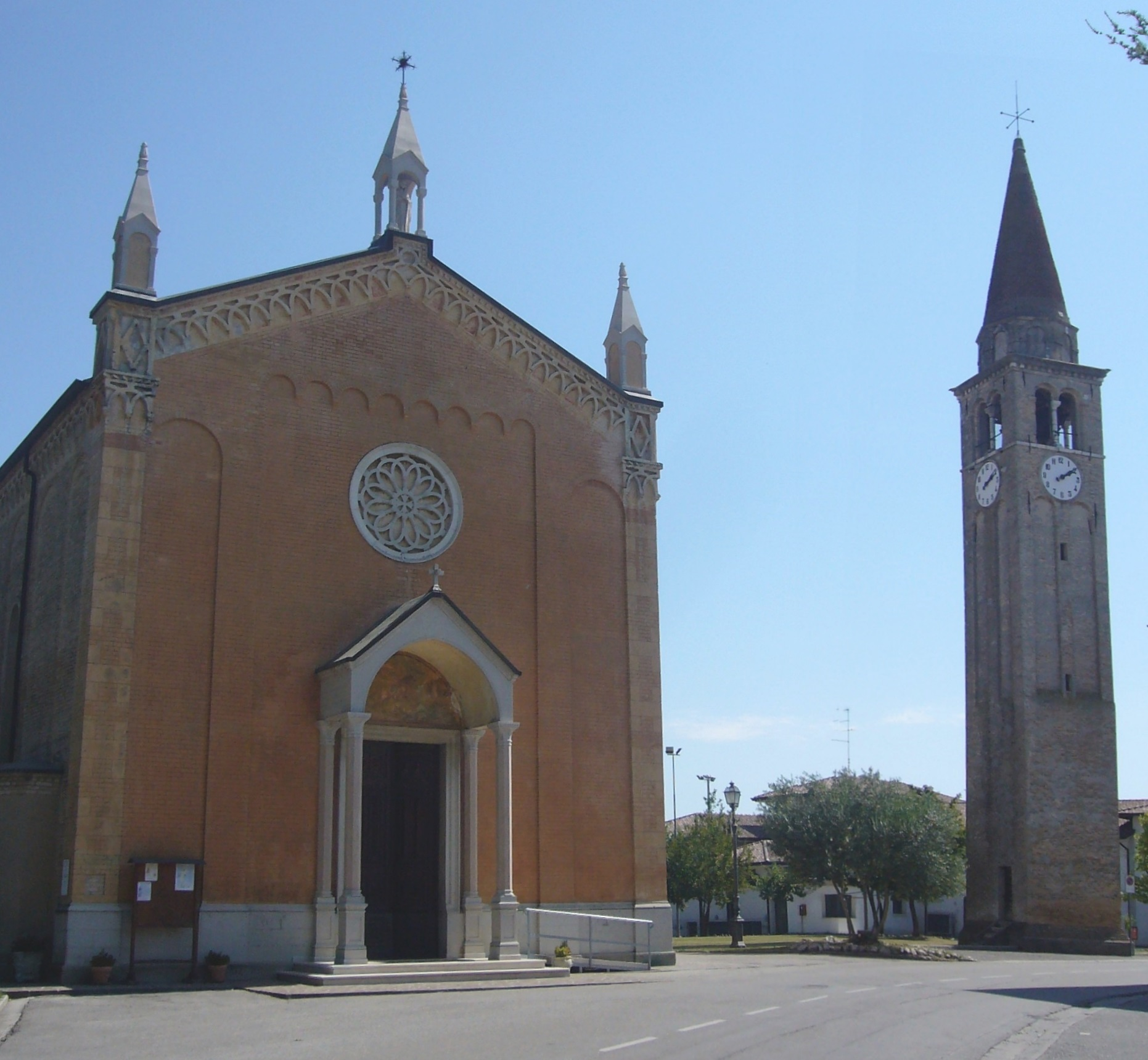 La chiesa parrocchiale di Chions, dedicata a San Giorgio